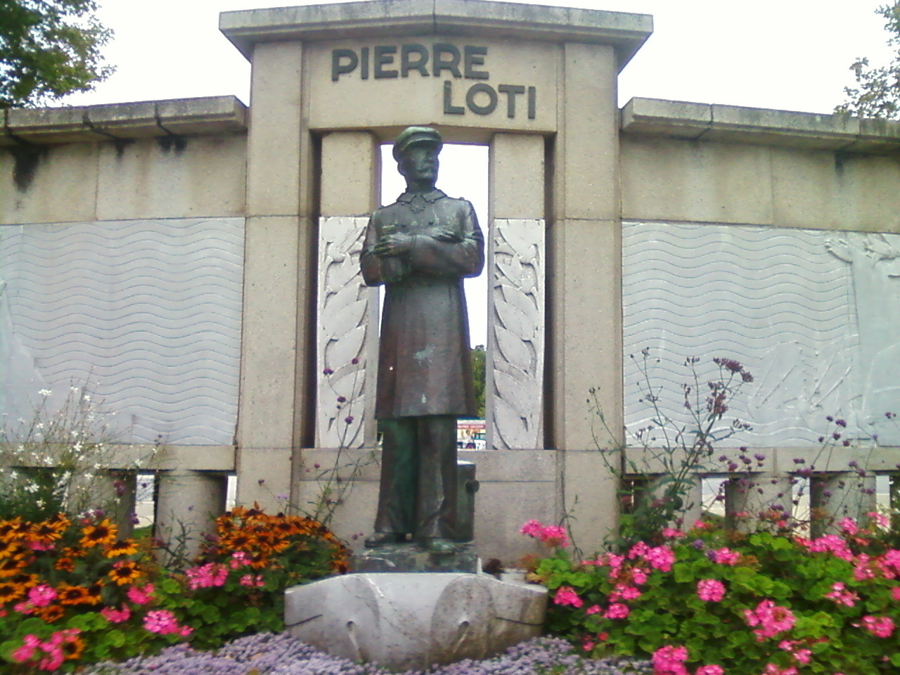 Monument Pierre Loti 02 (Rochefort (17))